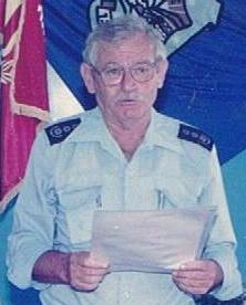 אמנון ענבר בתפקידו כמפקד תחנת כיבוי אש רמת-גן